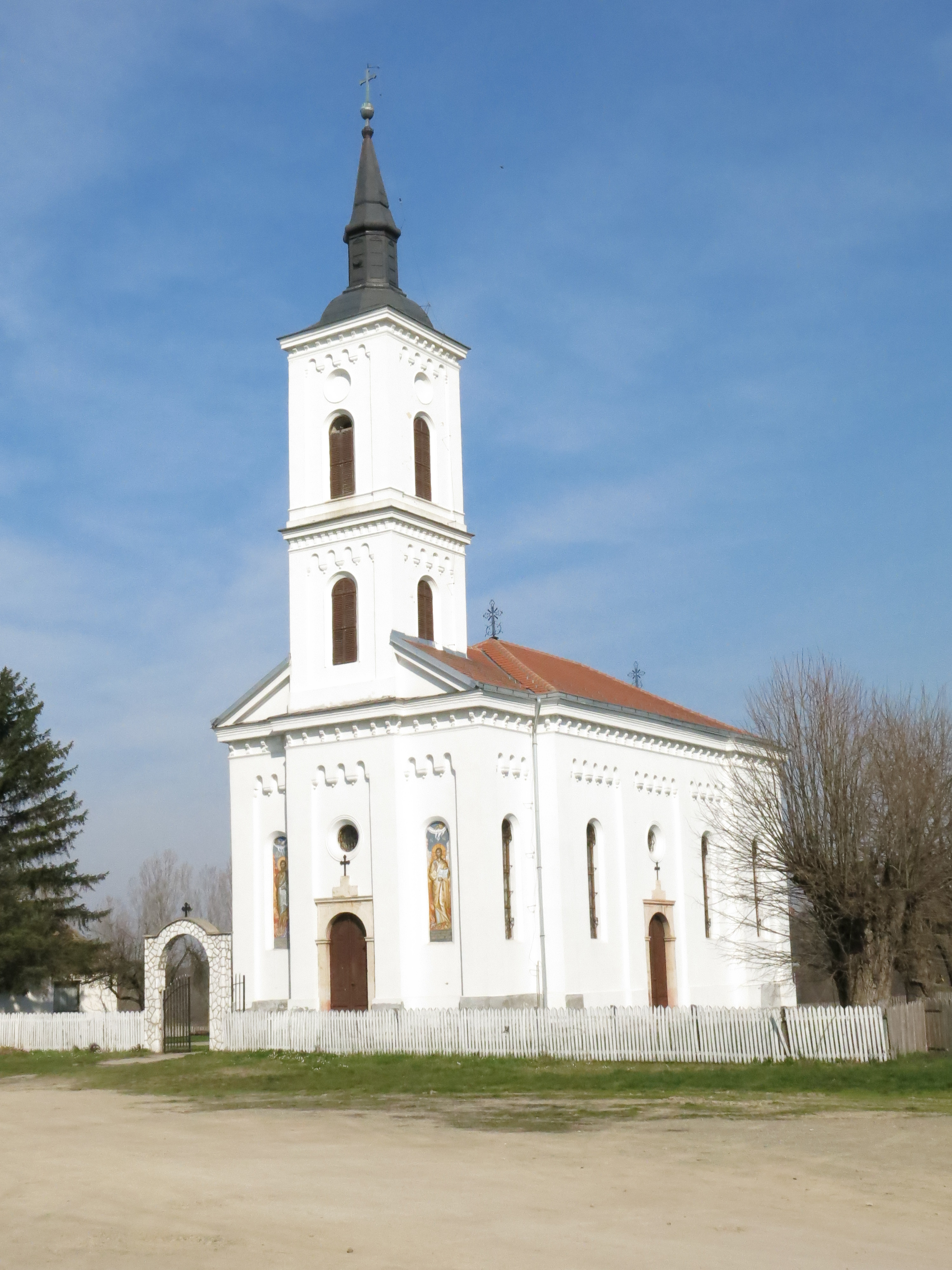 Накучани, Црква